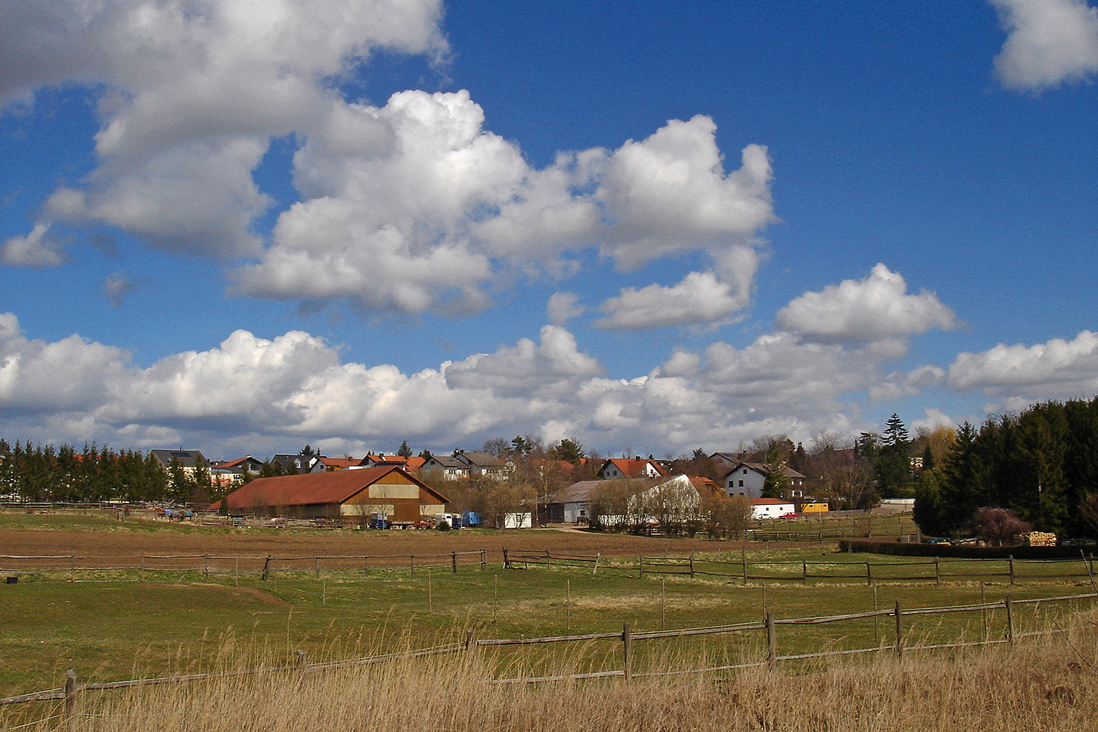 Lenting, Ansicht von Südwest